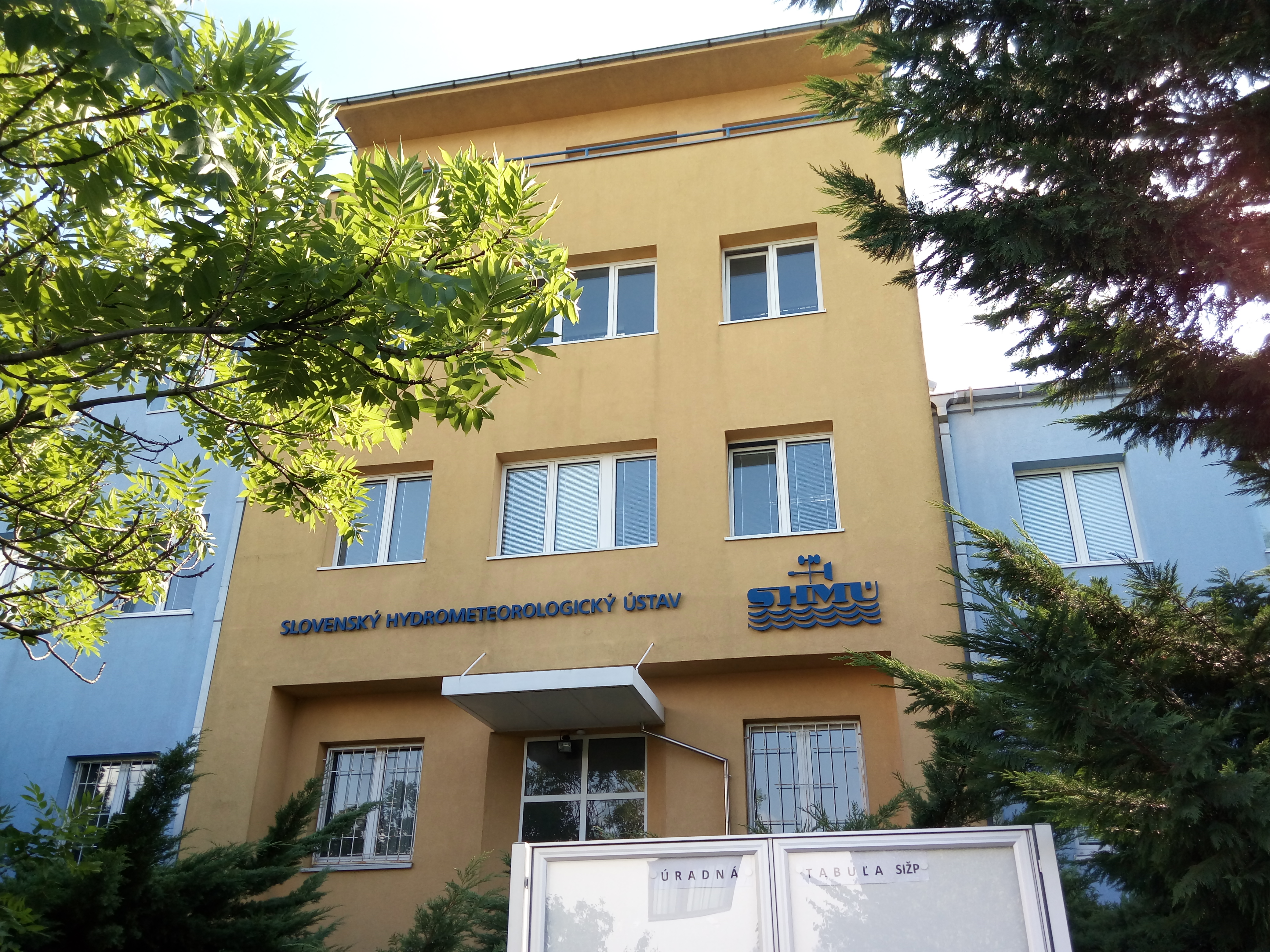 Slovenský hydrometeorologický ústav, Jeséniova 17, Nové Mesto, Bratislava